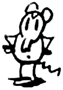 Ignatz Mouse. Freigestellte Figur aus einem Krazy-Kat-Comic vom 4. November 1917, Bild 8